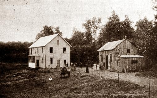 Colonie libertaire L'Essai à Aiglemont, Ardennes, France